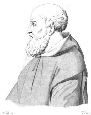 Francesco di Bartolo da Buti (Pisa o forse Buti, 1324 – Pisa, 25 luglio 1406), critico letterario italiano, uno dei primi commentatori della Divina Commedia.